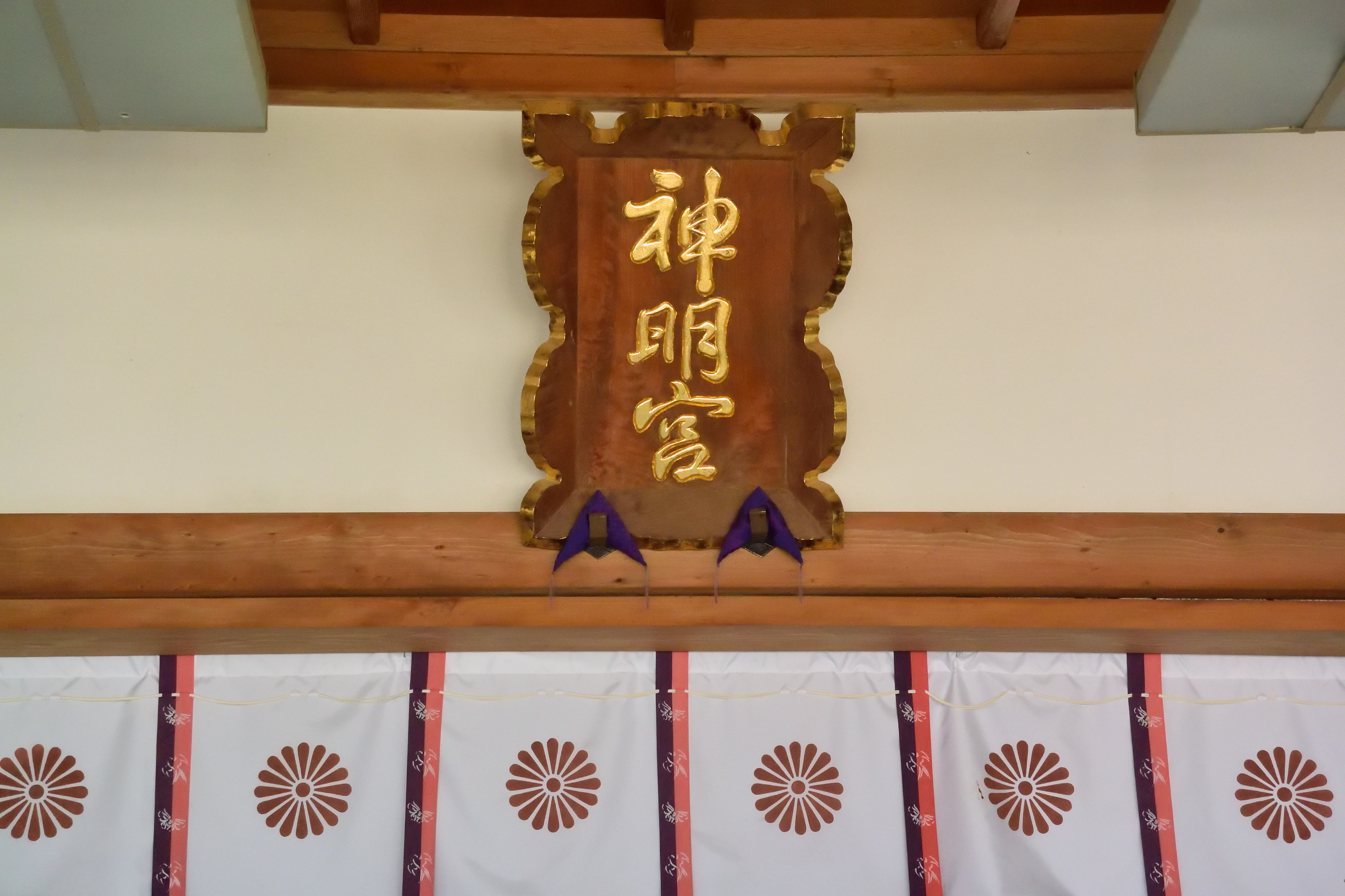 坪野神明社扁額